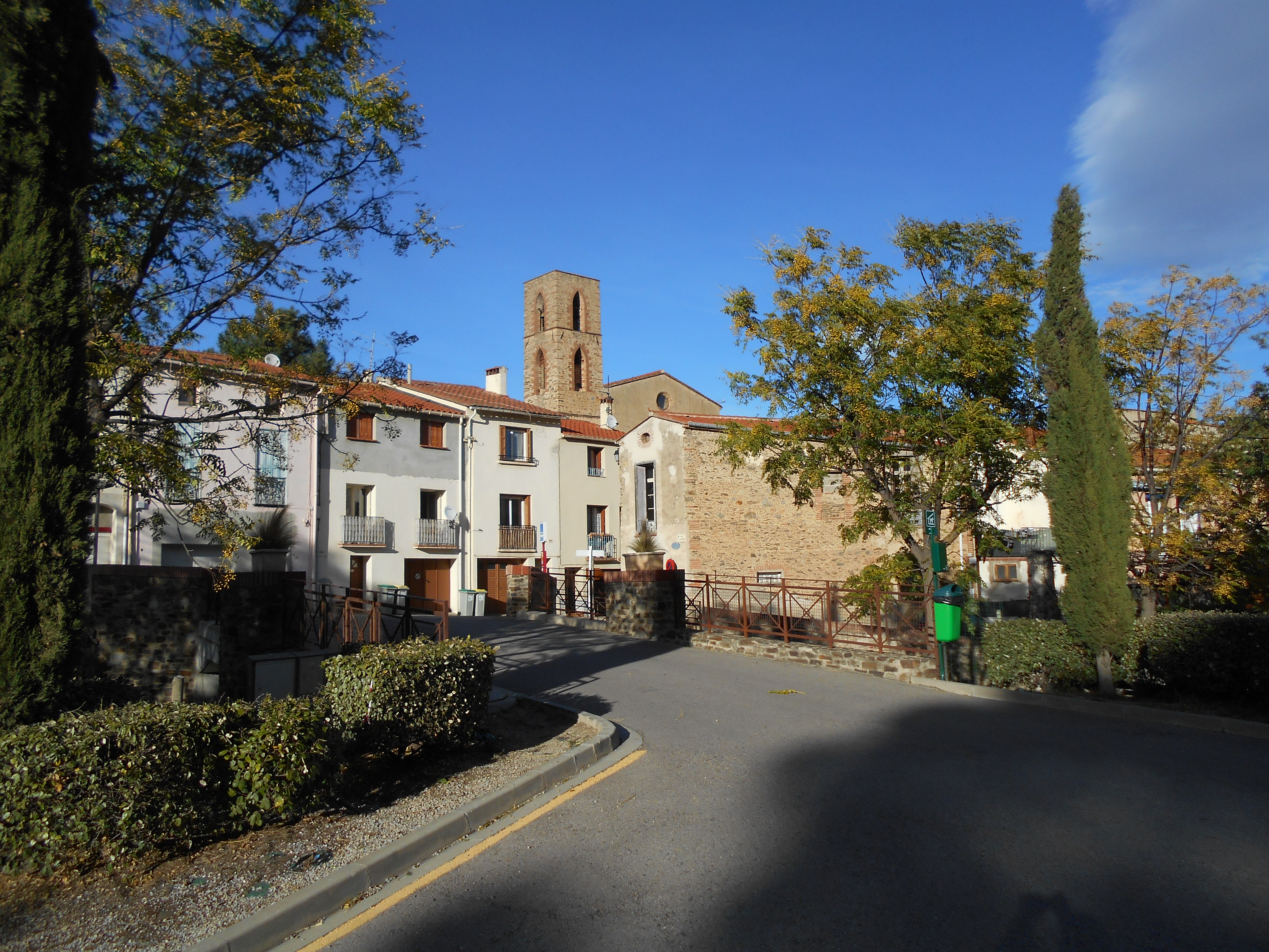 El poble de Corbera, al Rosselló